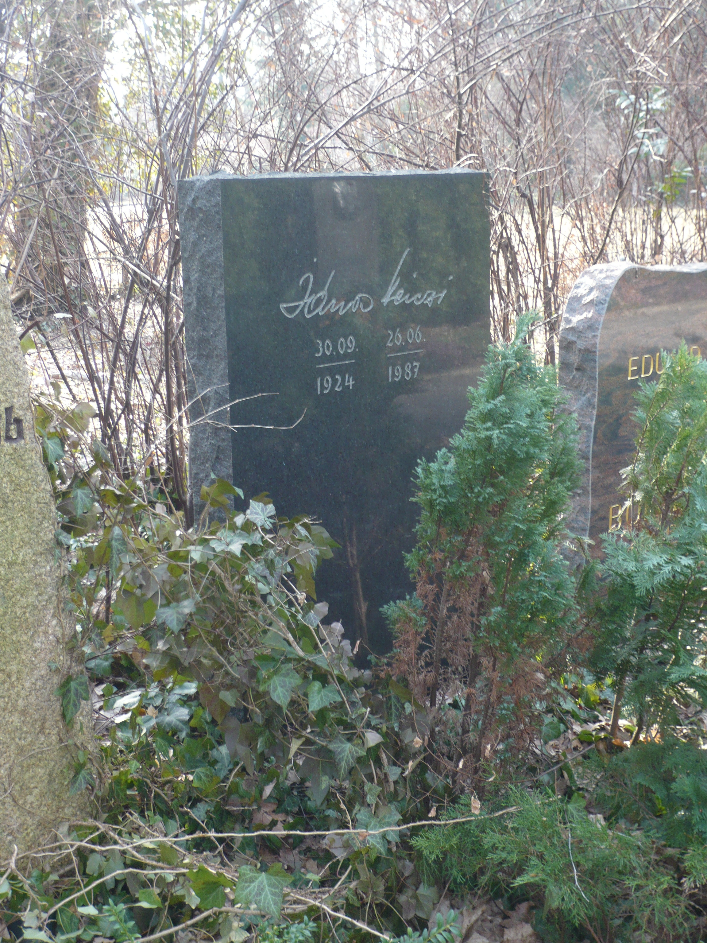 Grab auf dem Zentralfriedhof Friedrichsfelde: ungarisch-deutscher Regisseur